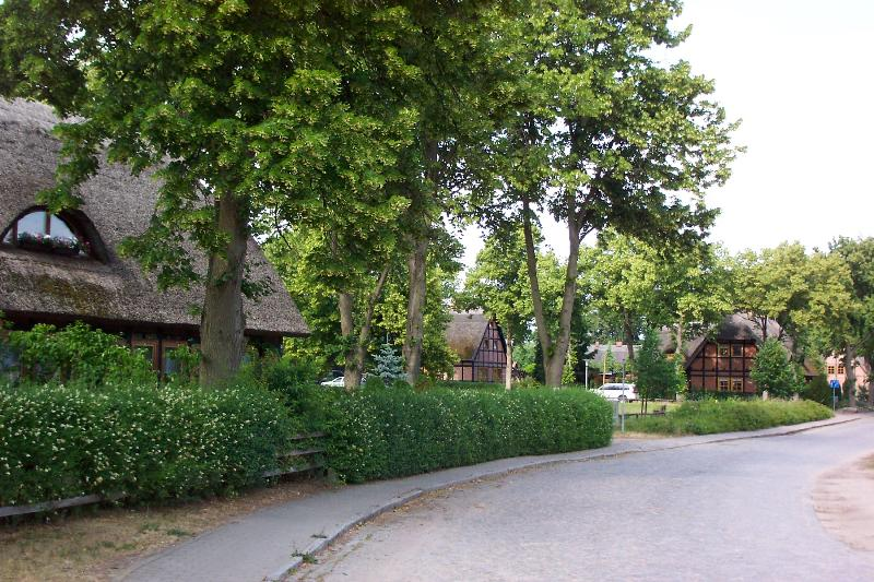 Alt Rhese bei Neubrandenburg